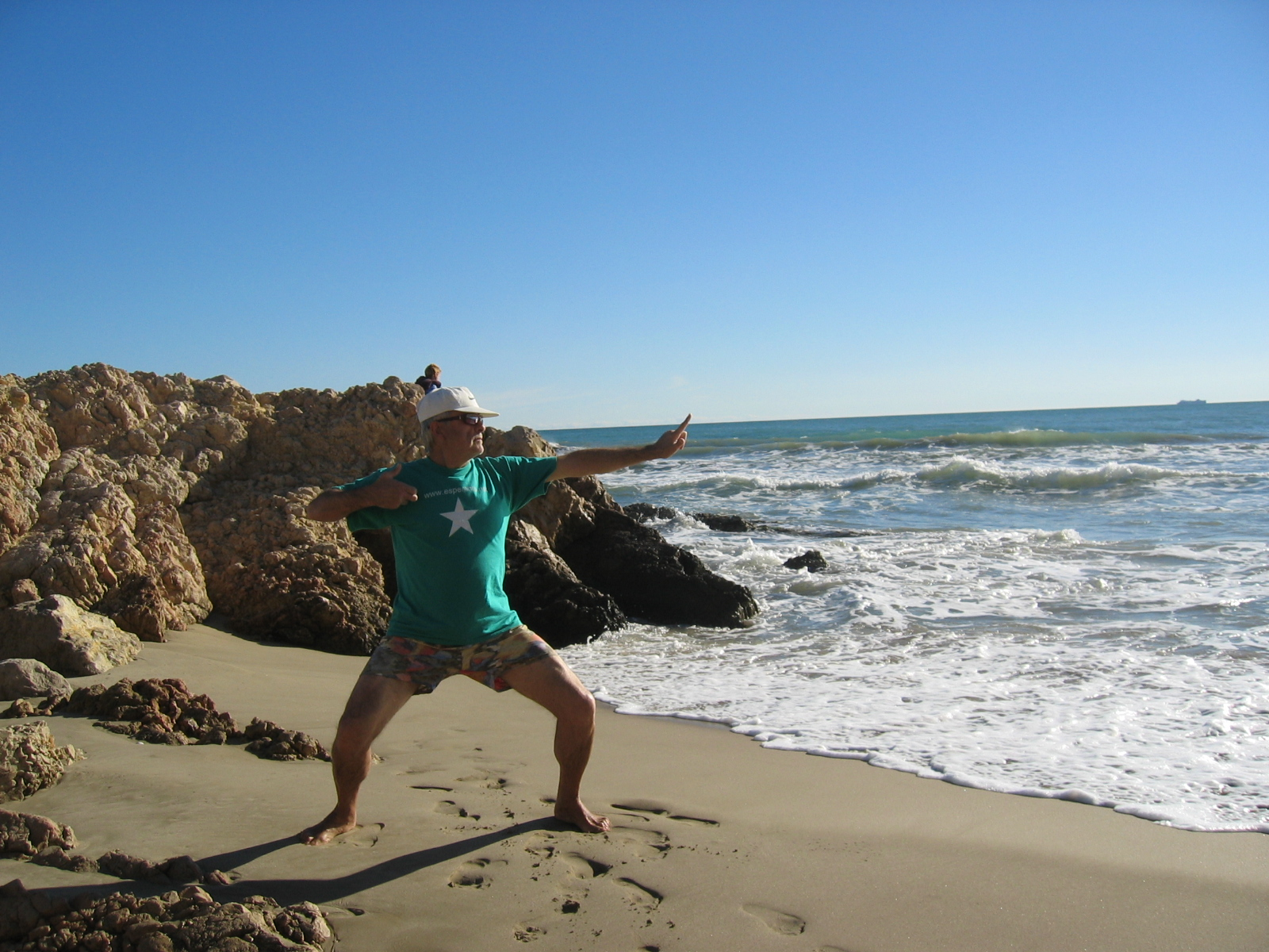 2n moviment de txi kung - Baduanjin foto meva novembre 2006 Joan Inglada Lliure ús